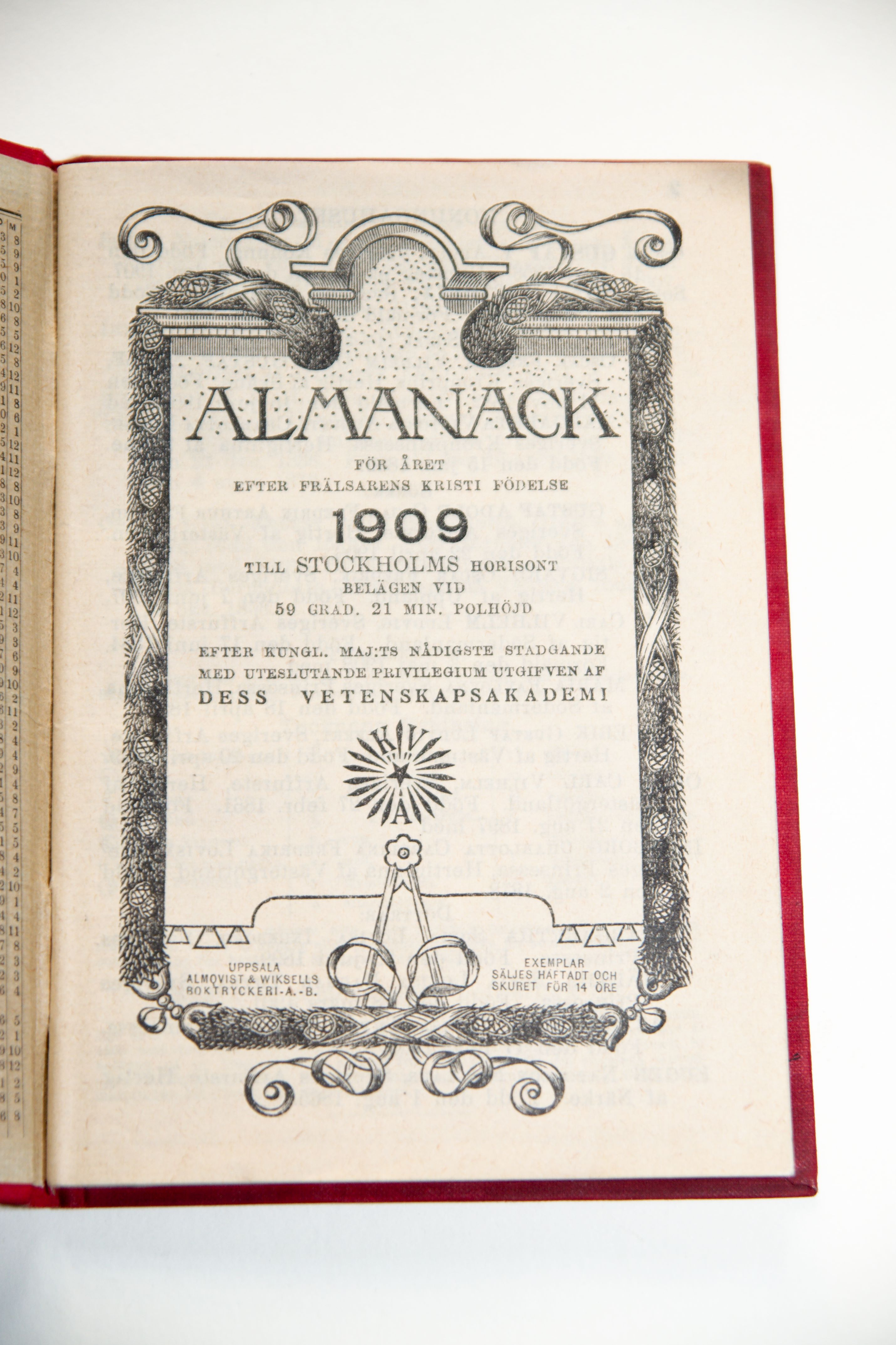 föremål i Höskullen